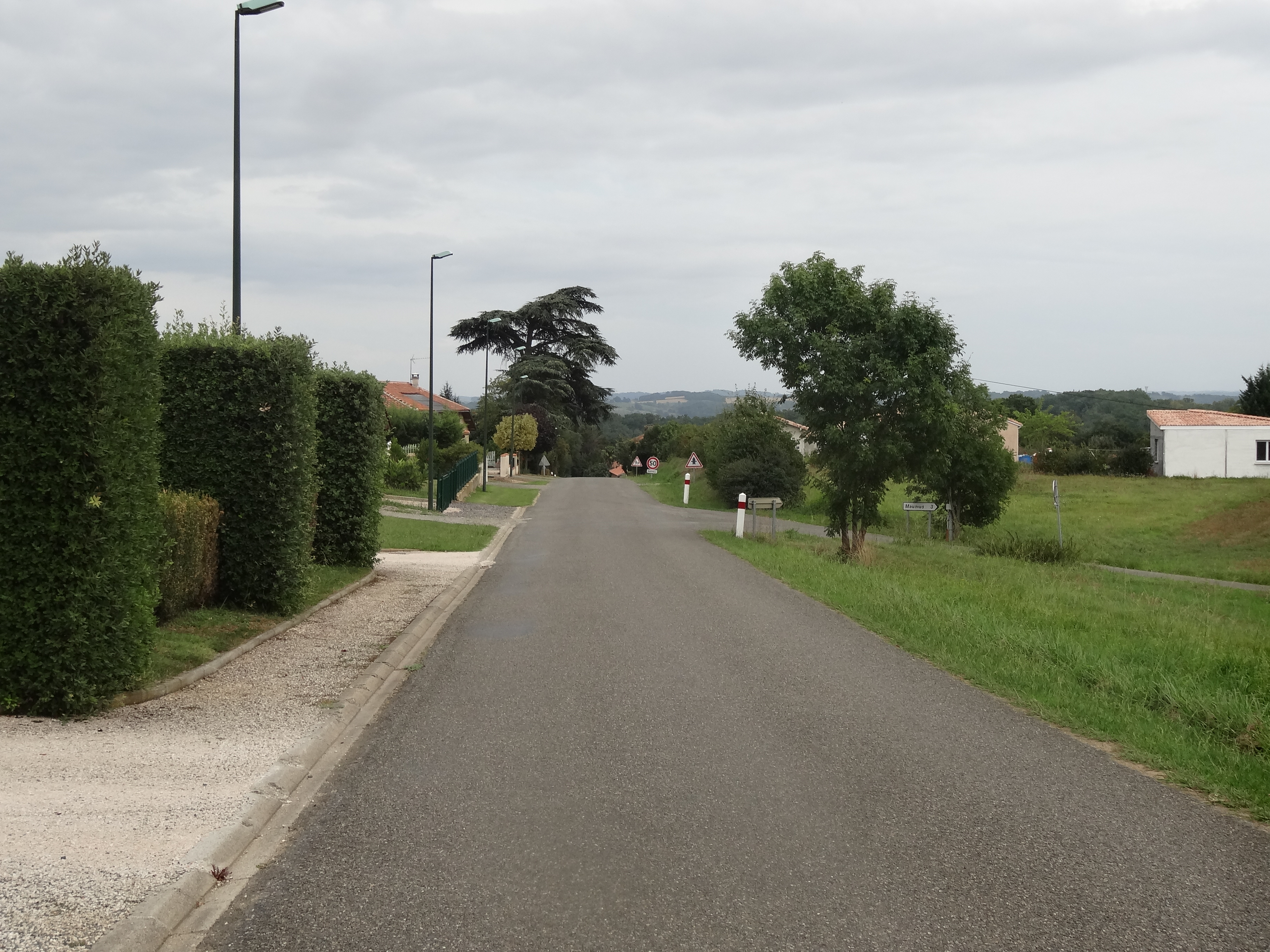 Route principale de Sadeillan.